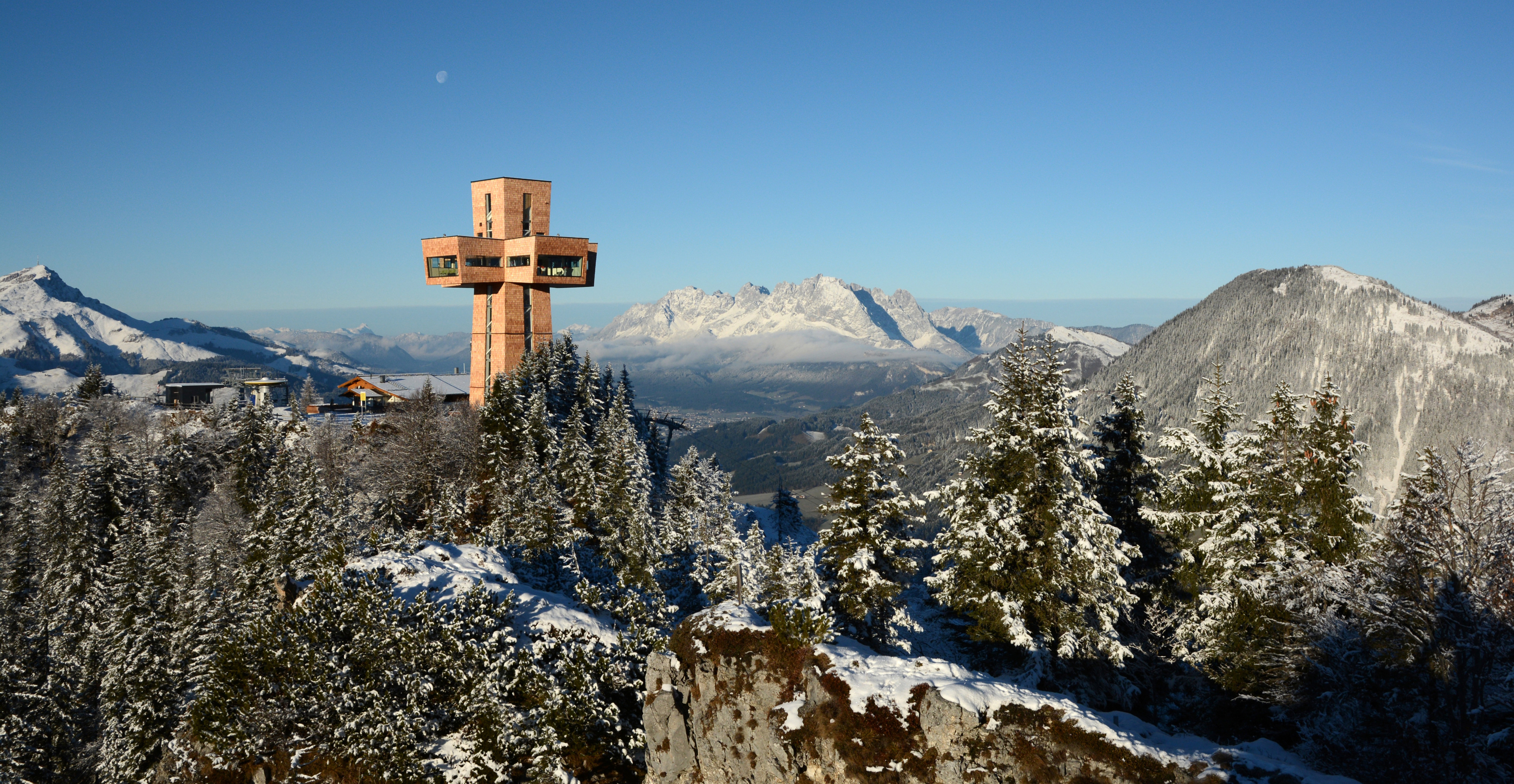 Die Nacht vom 9. auf den 10. Dezember 2014 bescherte Tirol den ersten Schnee des Winters. Dies ist das erste Bild vom Jakobskreuz im Schnee. Im Hintergrund links das Kitzbüheler Horn, in der Mitte die Silhouette des Wilden Kaisers. Links über dem Kreuz der bald untergehende Mond. Im Vordergrund die Buchensteinwand. This media shows the remarkable cultural object in the Austrian state of Tyrol listed by the Tyrolean Art Cadastre with the ID 135318. (on tirisMaps, on tirisdienste.at, pdf, more images on Commons)